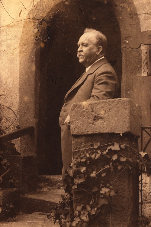 Paul Umlauft, stehend